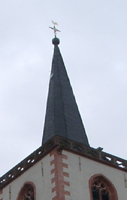 Eberhard Fäßchen an der Spitze de Wallfahrtskirche Maria Heimsuchung in Klausen in der Eifel